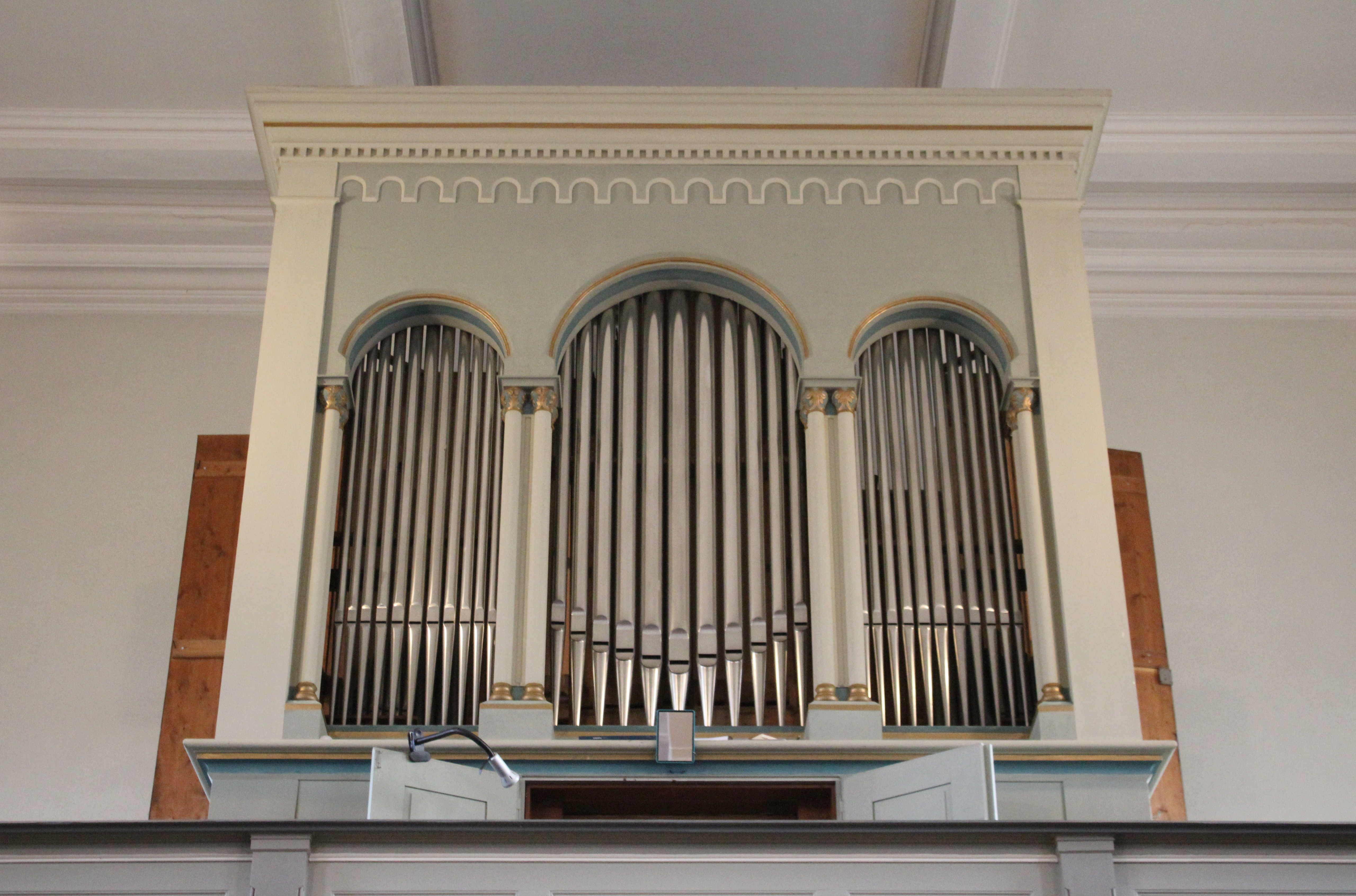 Evangelische Kirche Merlau, Gemeinde Mücke, Vogelsbergkreis, Hessen, Deutschland